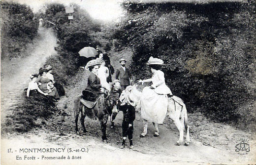 Montmorency (France) - En forêt - Promenade à ânes vers 1900